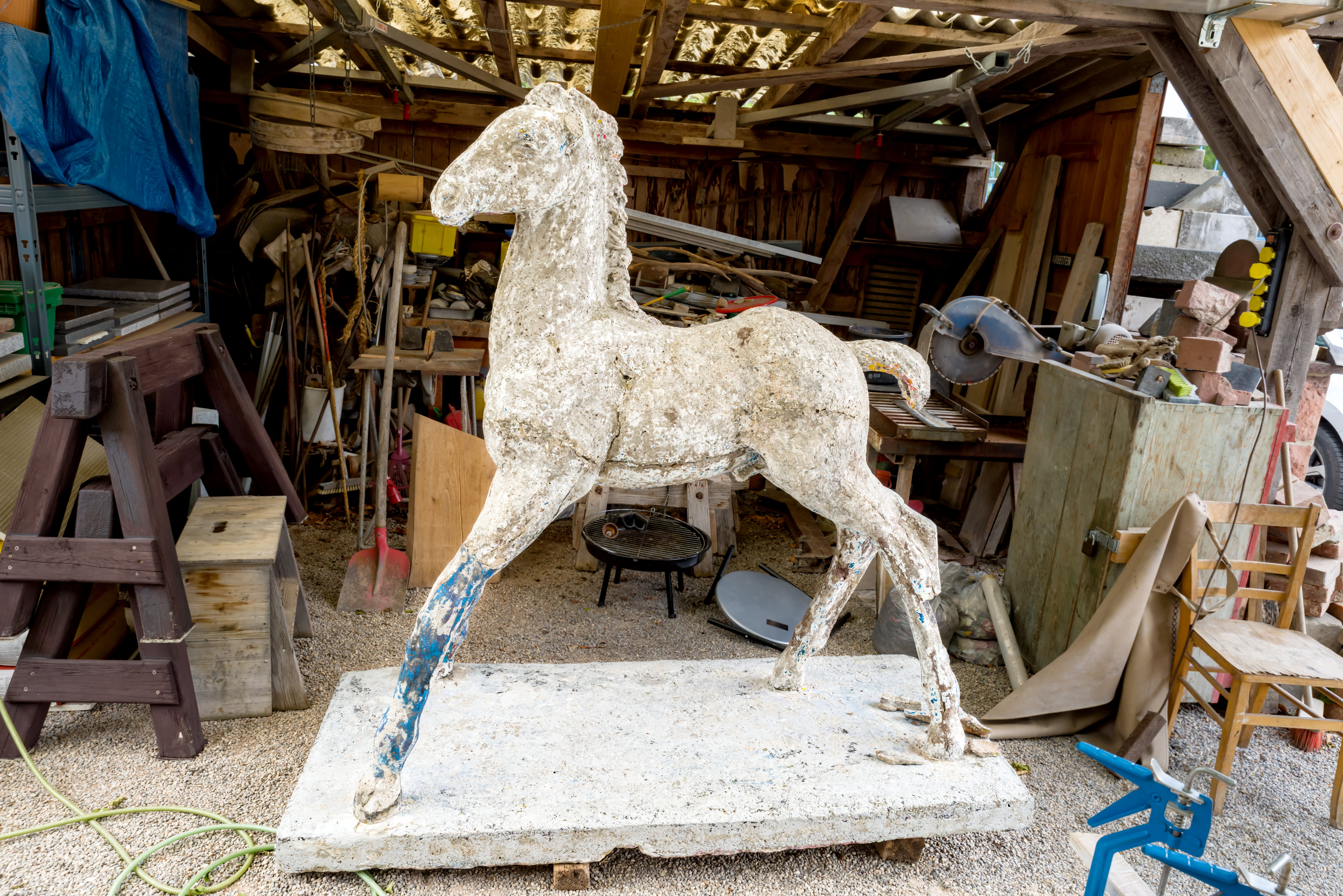 Restaurierung Holbeinpferdle. Alles ist runter